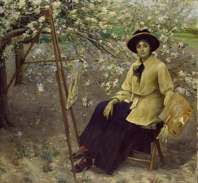 Julie Feurgard par Louise Breslau dans le jardin de Sannois (1886)